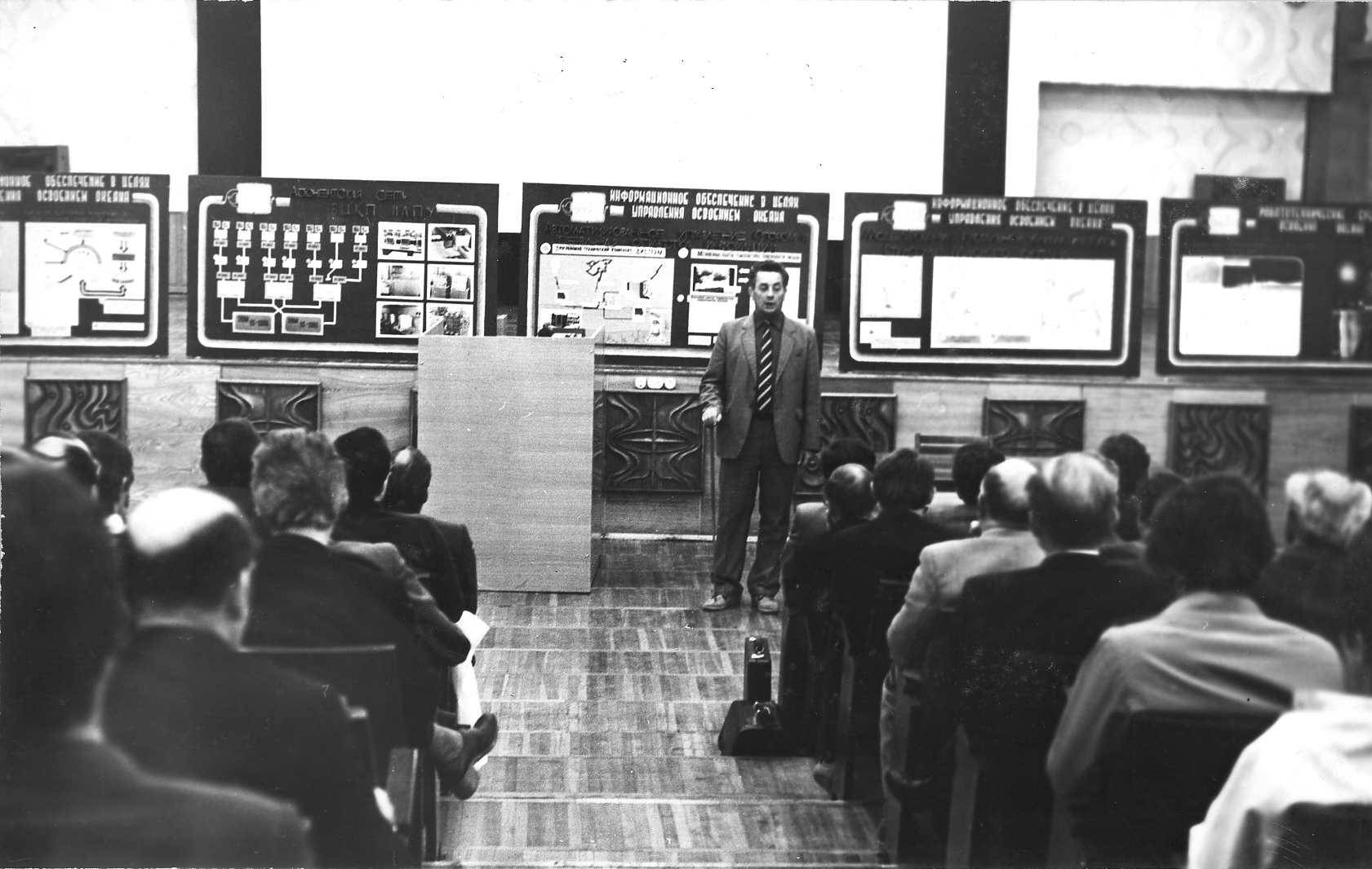 ИАПУ ДВО РАН Владивосток, Радио 5. Заседание Учёного Совета.